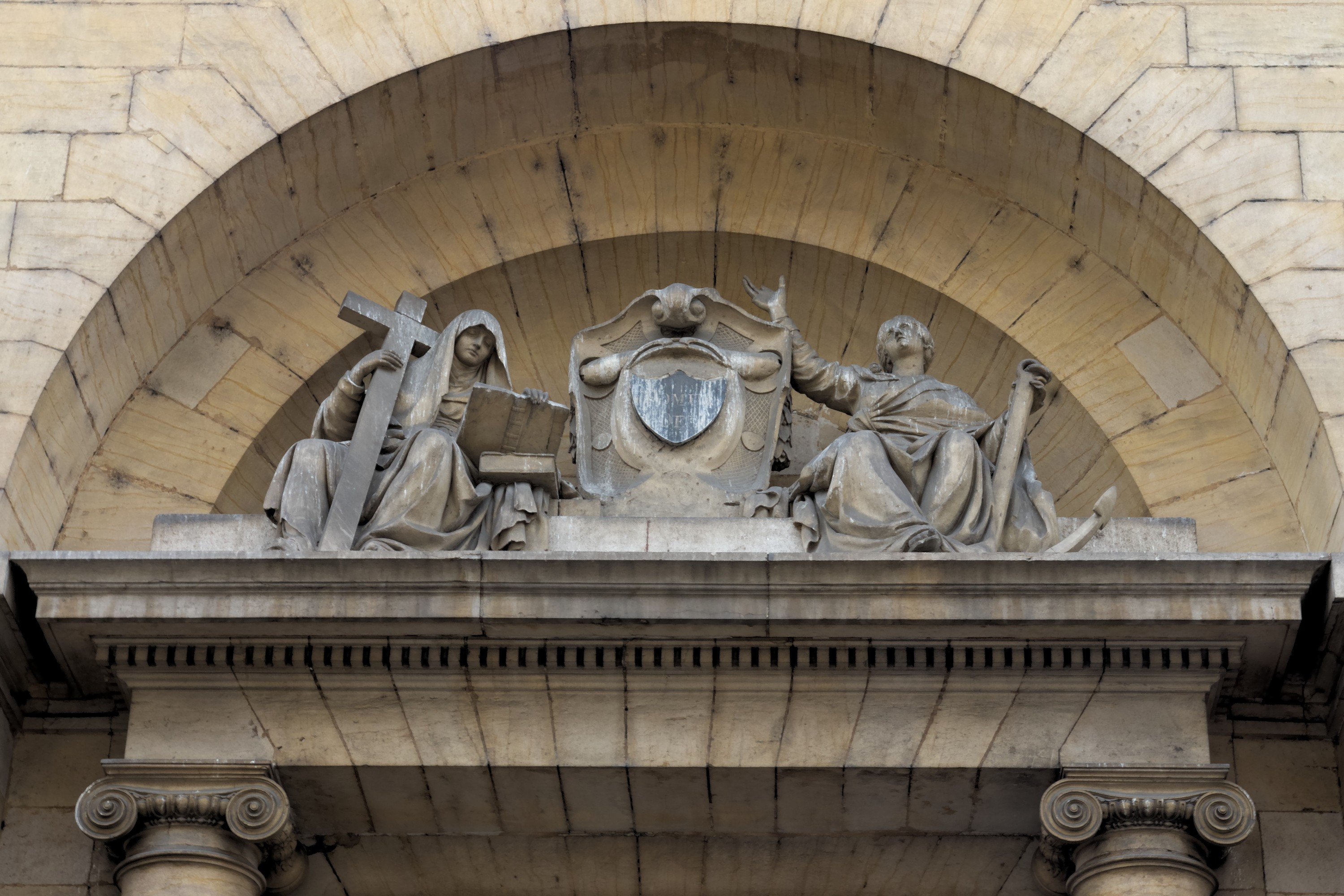 Groupe sculpté de Johann Joseph Söntgen représentant des allégories de la Foi & l'Espérance. Inscription : DOMUS DEI (traduction : Maison de Dieu).